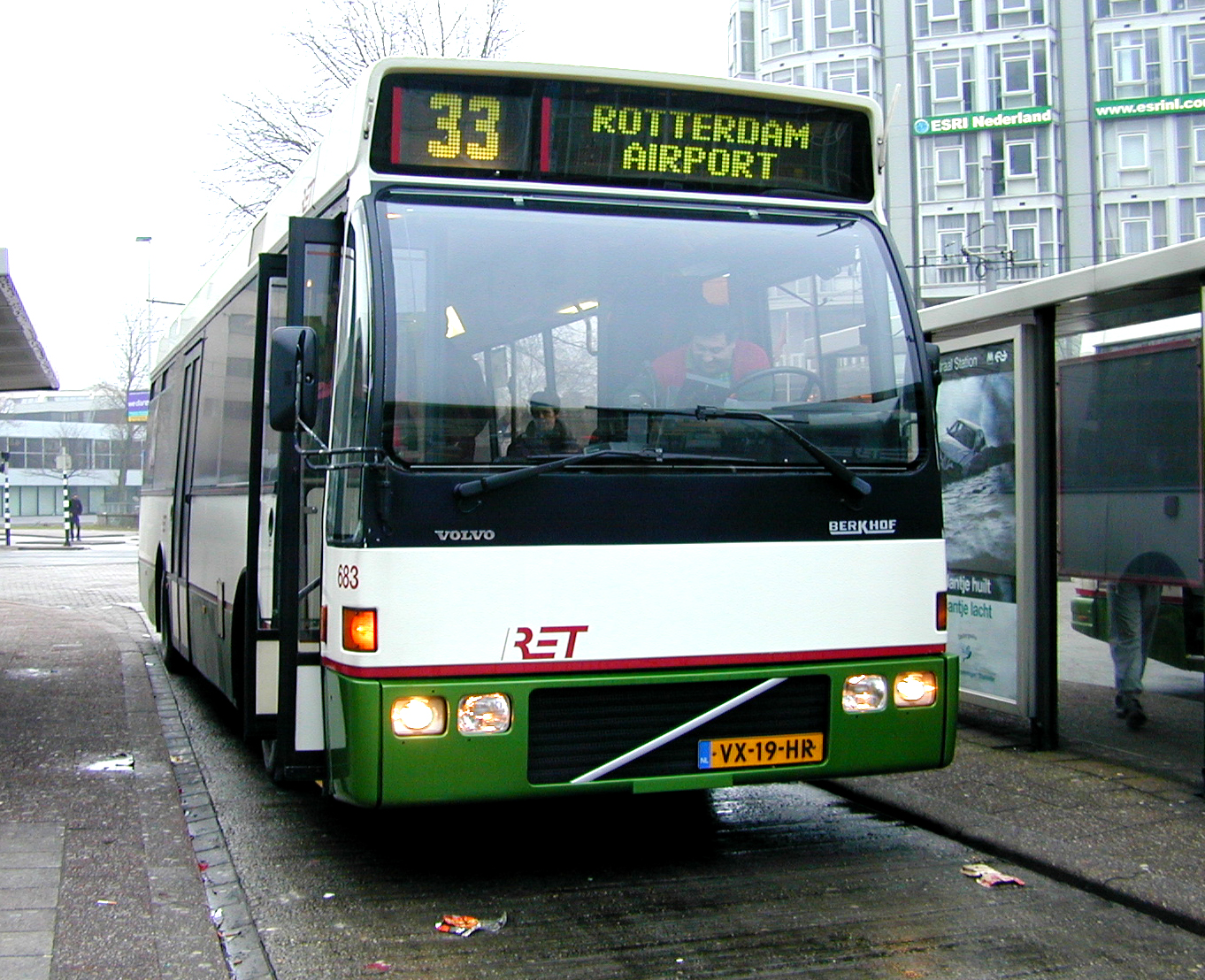 Rotterdamse Elektrische Tram (RET) bus 683 van het type Berkhof/Volvo B10B-55 Duvedec-bus te Rotterdam.